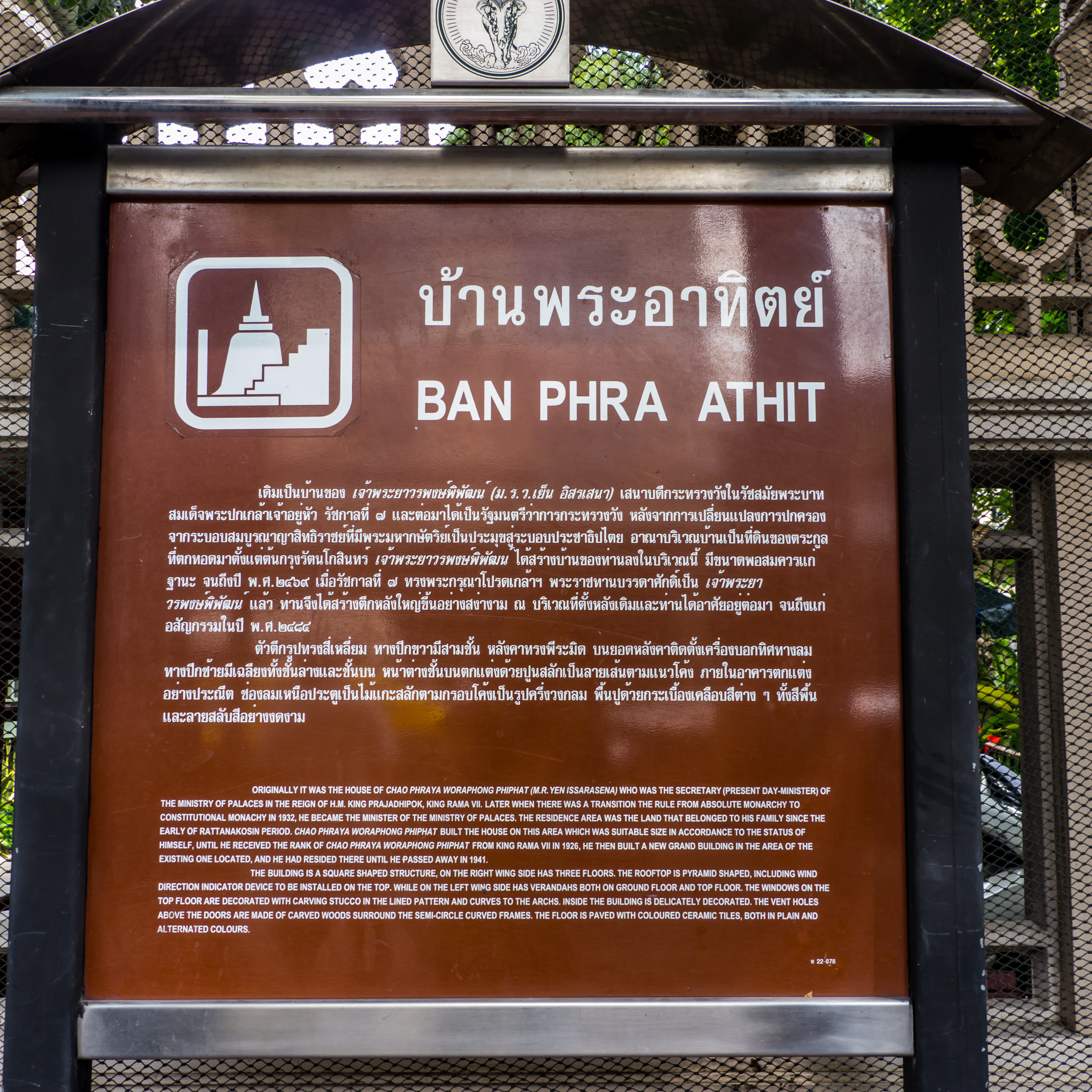 บ้านพระอาทิตย์ ไม่อนุญาตให้ถ่ายภาพตัวอาคาร